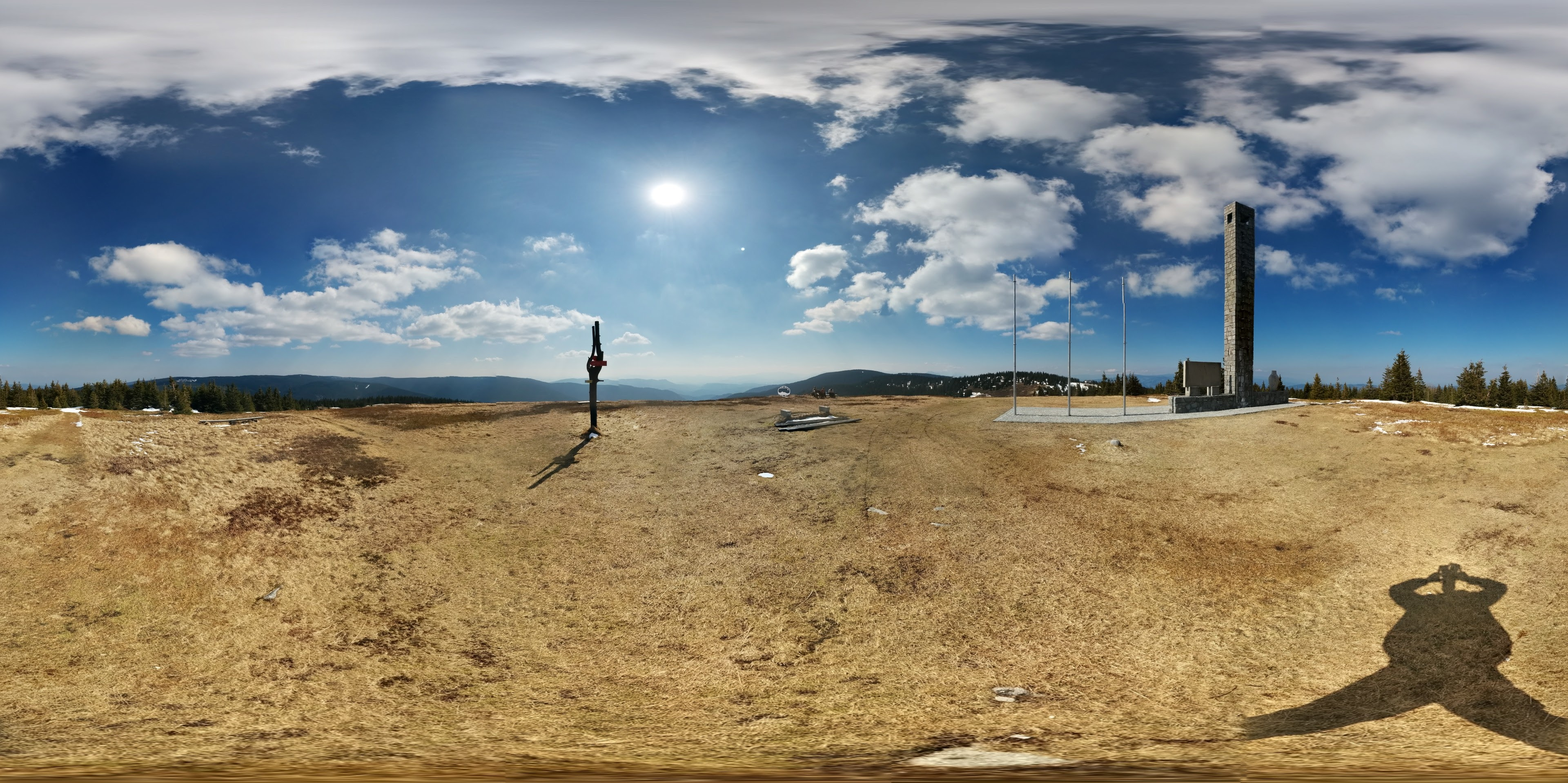 Jezerski vrh